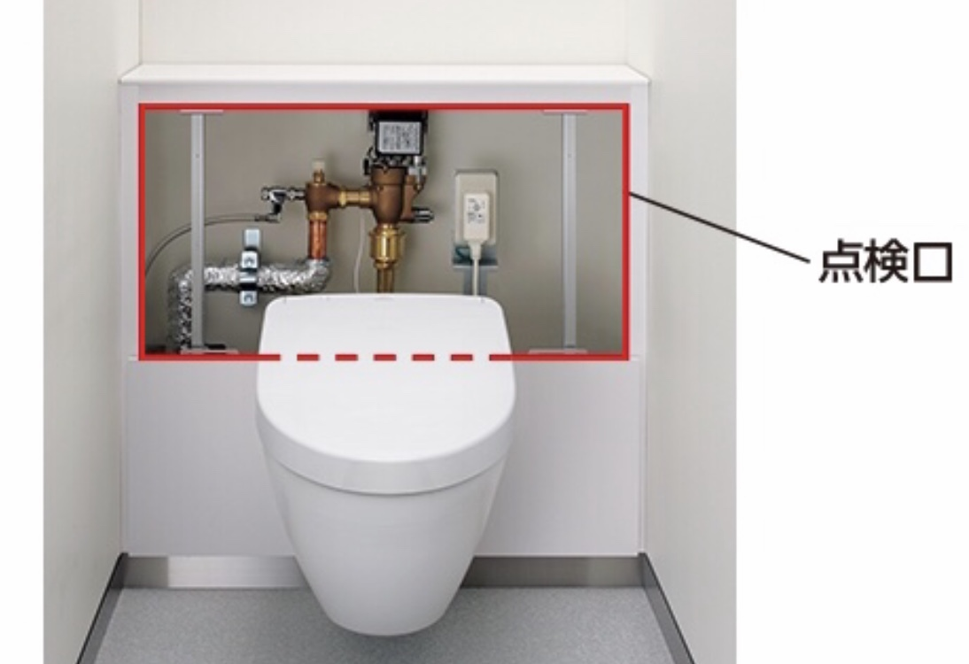 FV 点検